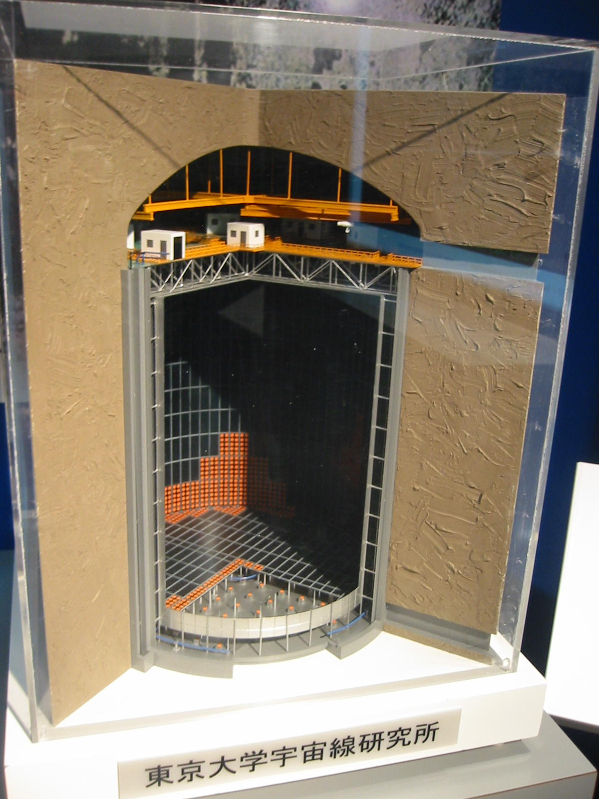 カミオカンデ模型 明石天文科学館にて